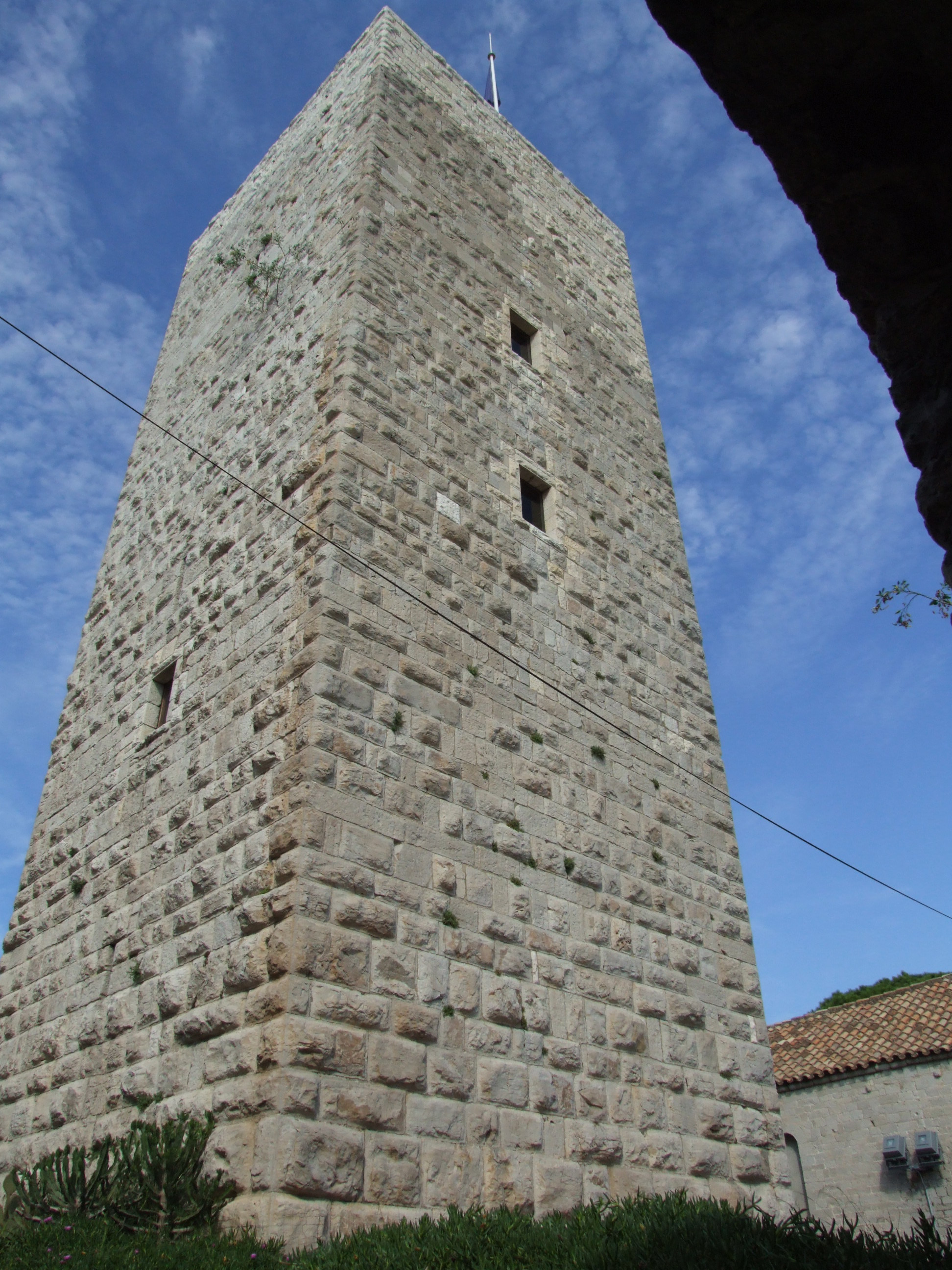 Tour de la Castre, Le Suquet, Cannes, France